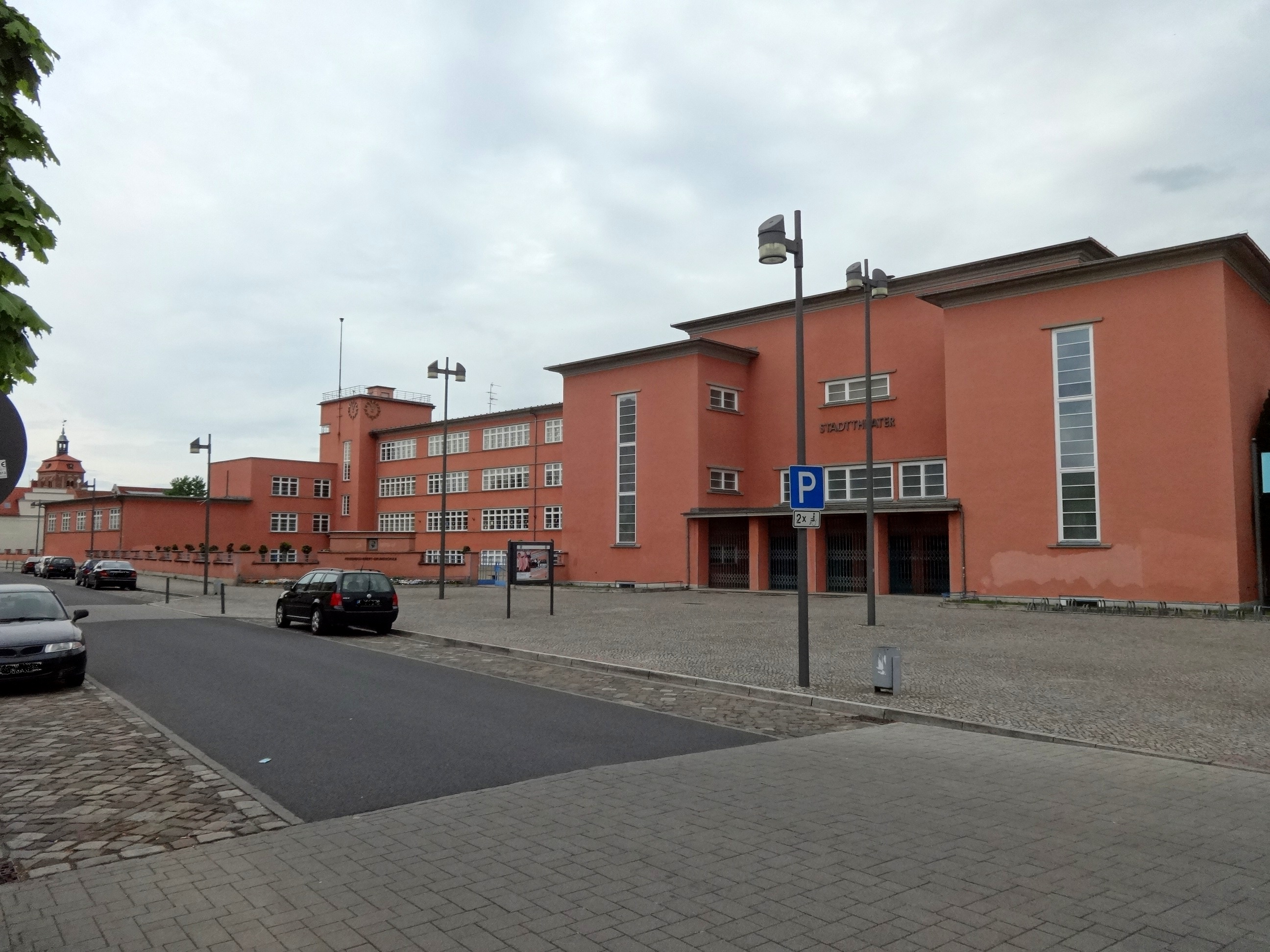 Das Stadttheater und Friedrich-Ebert-Grundschule entstand in den Jahren 1927 bis 1930 unter der Leitung von Rudolf Brennecke, Paul Backes und Hans Graf. Das denkmalgeschützte Bauwerk ist ein Beispiel für das Neue Bauen.